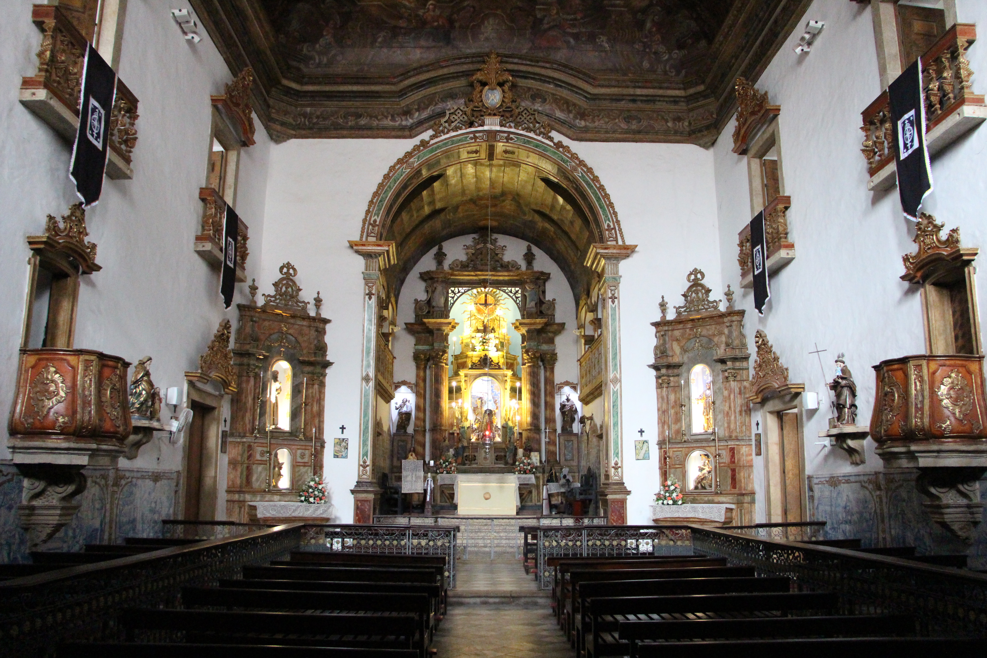 Igreja de Nossa Senhora do Rosário dos Pretos